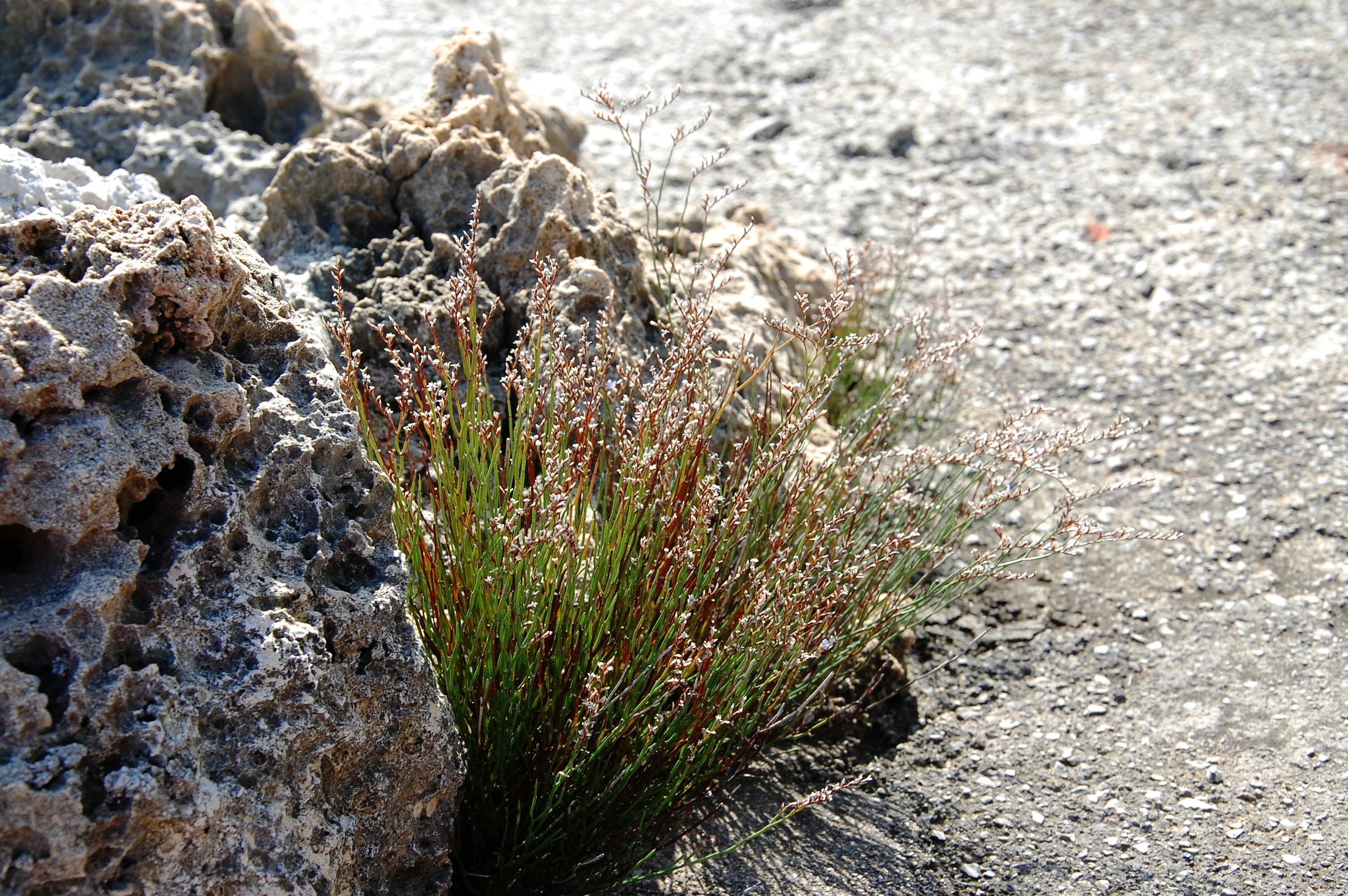 Limonium bocconei Addaura, Sicily